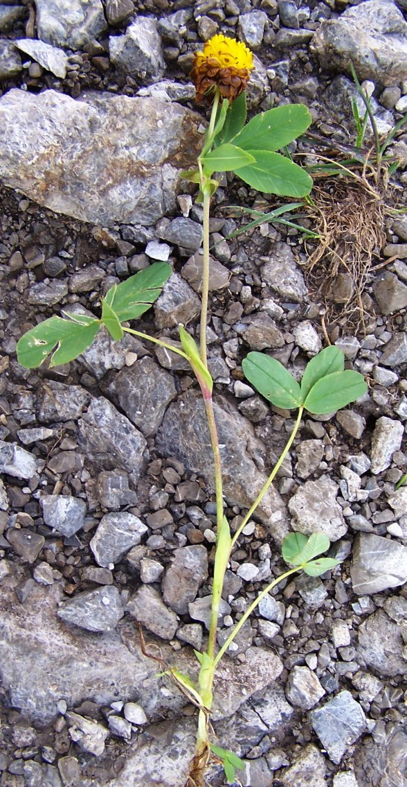 Trifolium badium (pl. koniczyna brunatna), habitat: West Tatra Mountains, Hala Upłaz